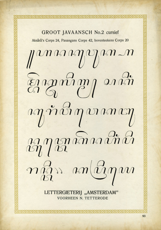 Aksara Jawa bikinan Lettergieterij Amsterdam